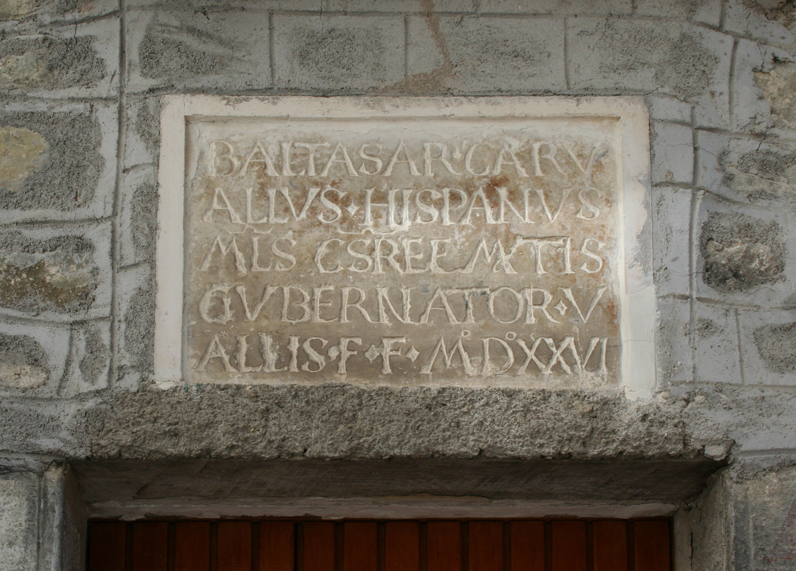 Pietracamela in provincia di Teramo, portale in pietra scolpito con iscrizione. Interno del paese.